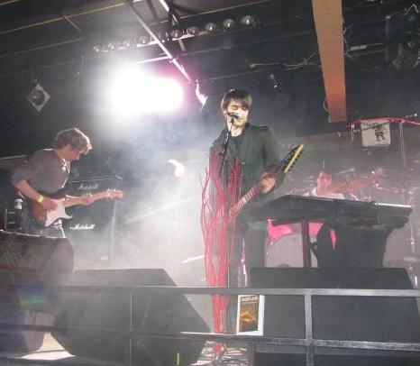 Concert de Catalepsie chez Paulette dans le cadre du tremplin Emergenza